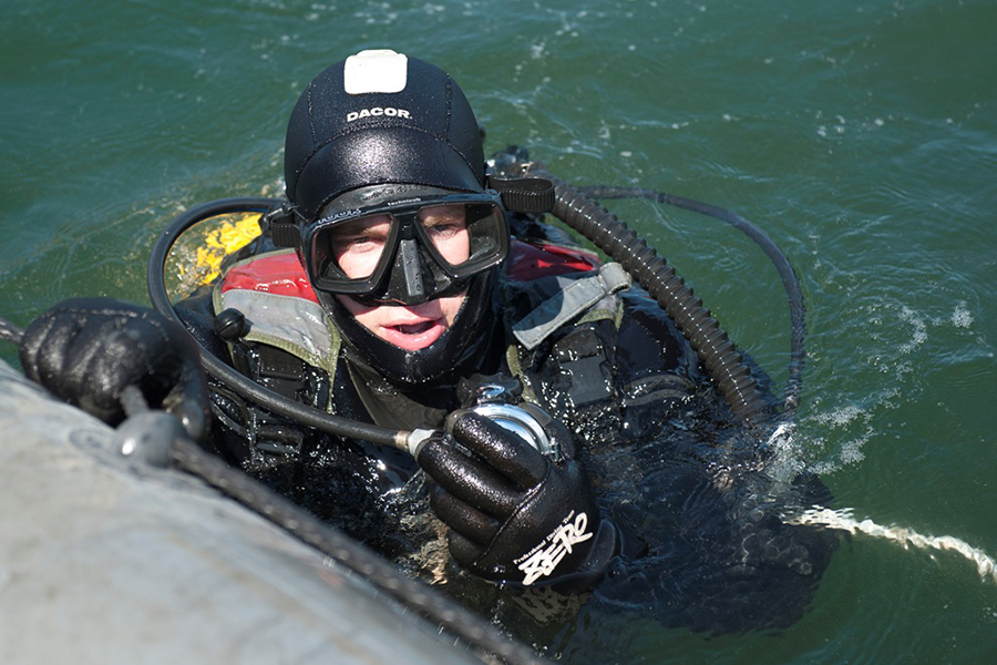 На Камчатке 311-й отряд по борьбе с подводными диверсионными силами и средствами отмечает свой профессиональный праздник.